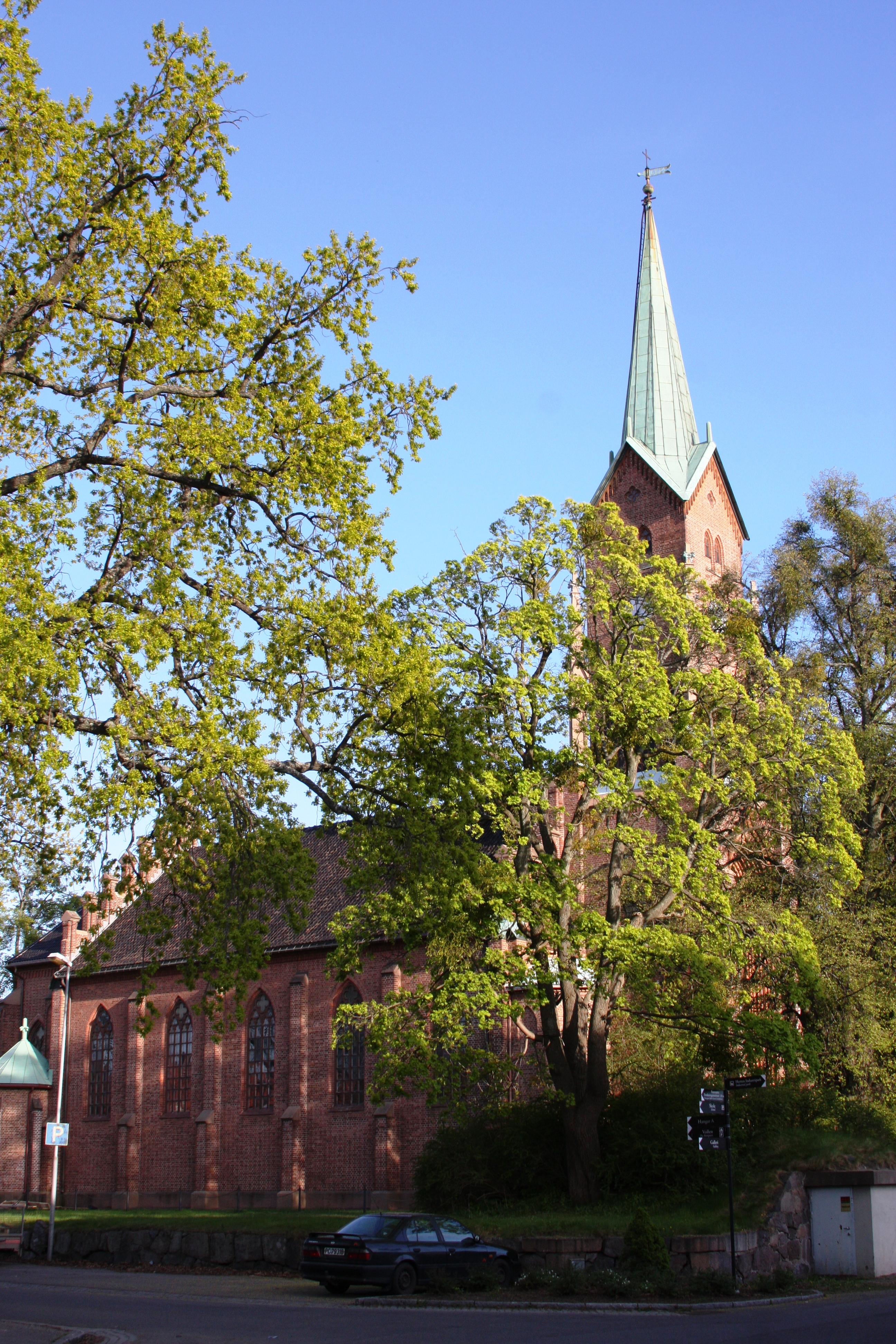 Karljohansvern, Horten kirke, Vestfold